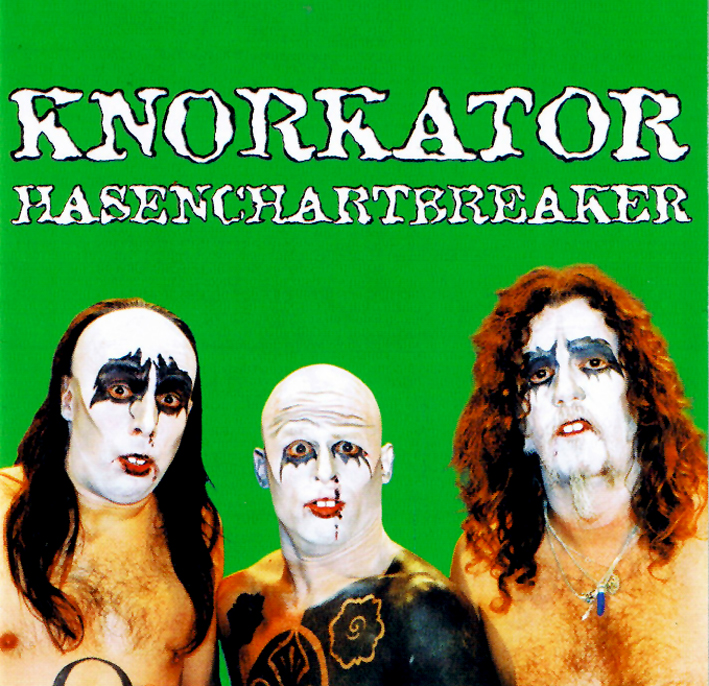 Artwork CD Hasenchartbreaker